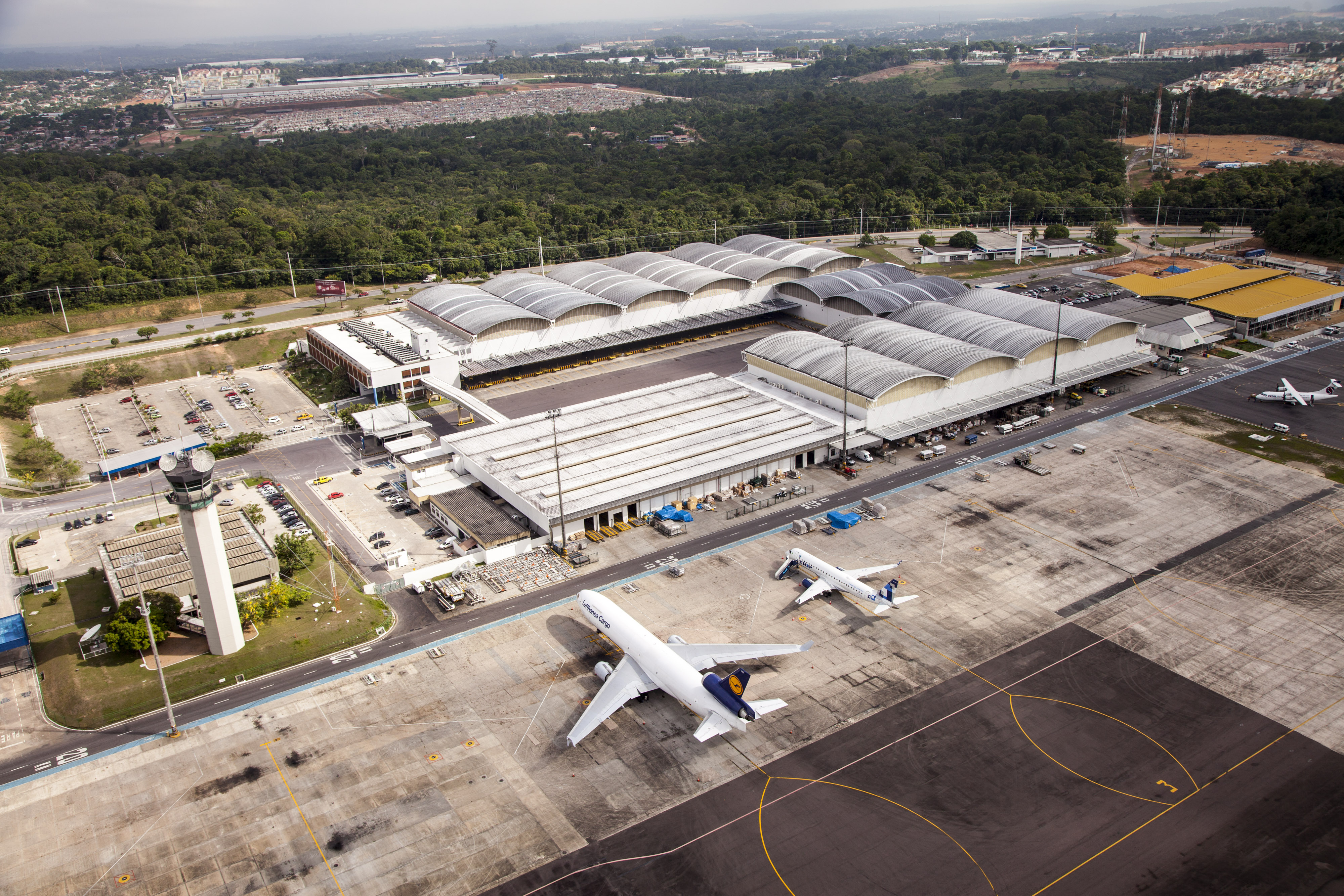 Terminal de logística de carga do Aeroporto Internacional de Manaus - Eduardo Gomes.